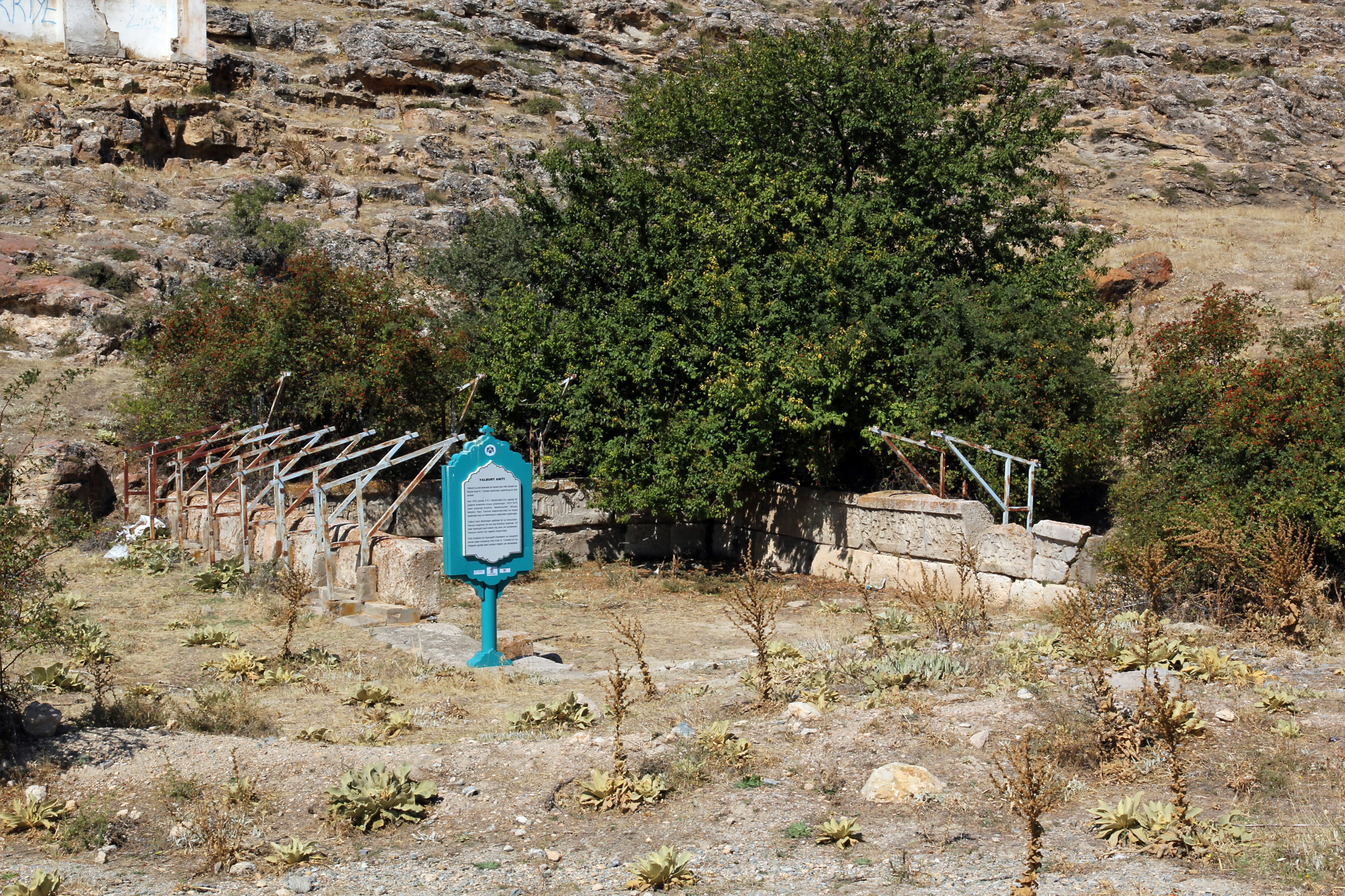 Yalburt, hethitisches Wasserbecken mit einem Feldzugsbericht Tudhalijas IV., nördlich Ilgın in der türkischen Provinz Konya. Gesamtansicht von Südosten